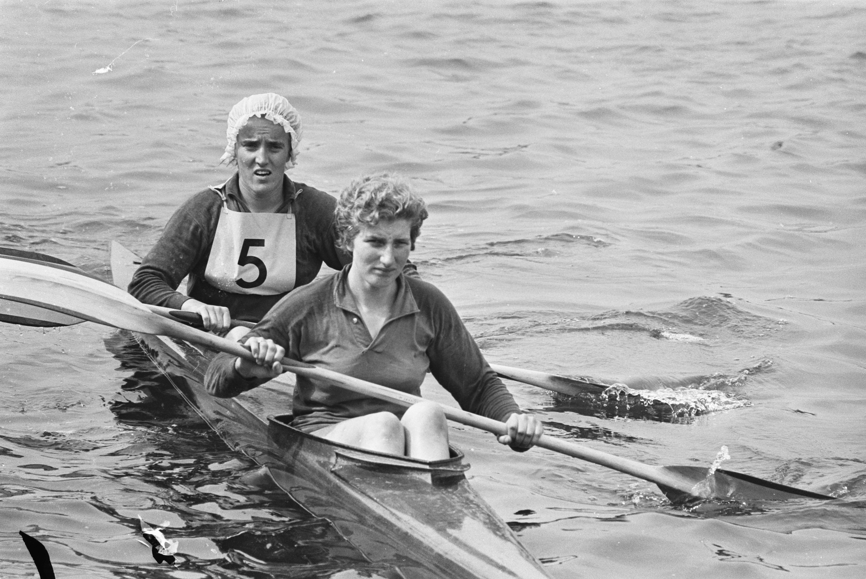 Collectie / Archief : Fotocollectie Anefo Reportage / Serie : [ onbekend ] Beschrijving : Internationale Kanowedstrijden op Voorzaan te Zaandam; Mieke Jaapies (rechts) en Maria Blijleven in boot; tweede plaats Datum : 7 juni 1970 Locatie : Noord-Holland, Zaandam, Zaanstad Trefwoorden : roeien Persoonsnaam : Jaapies, Mieke, Maria Blijleven Fotograaf : Verhoeff, Bert / Anefo Auteursrechthebbende : Nationaal Archief Materiaalsoort : Negatief (zwart/wit) Nummer archiefinventaris : bekijk toegang 2.24.01.05 Bestanddeelnummer : 923-5782